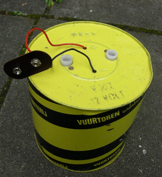 Een vuurtorenbatterij van 12 V